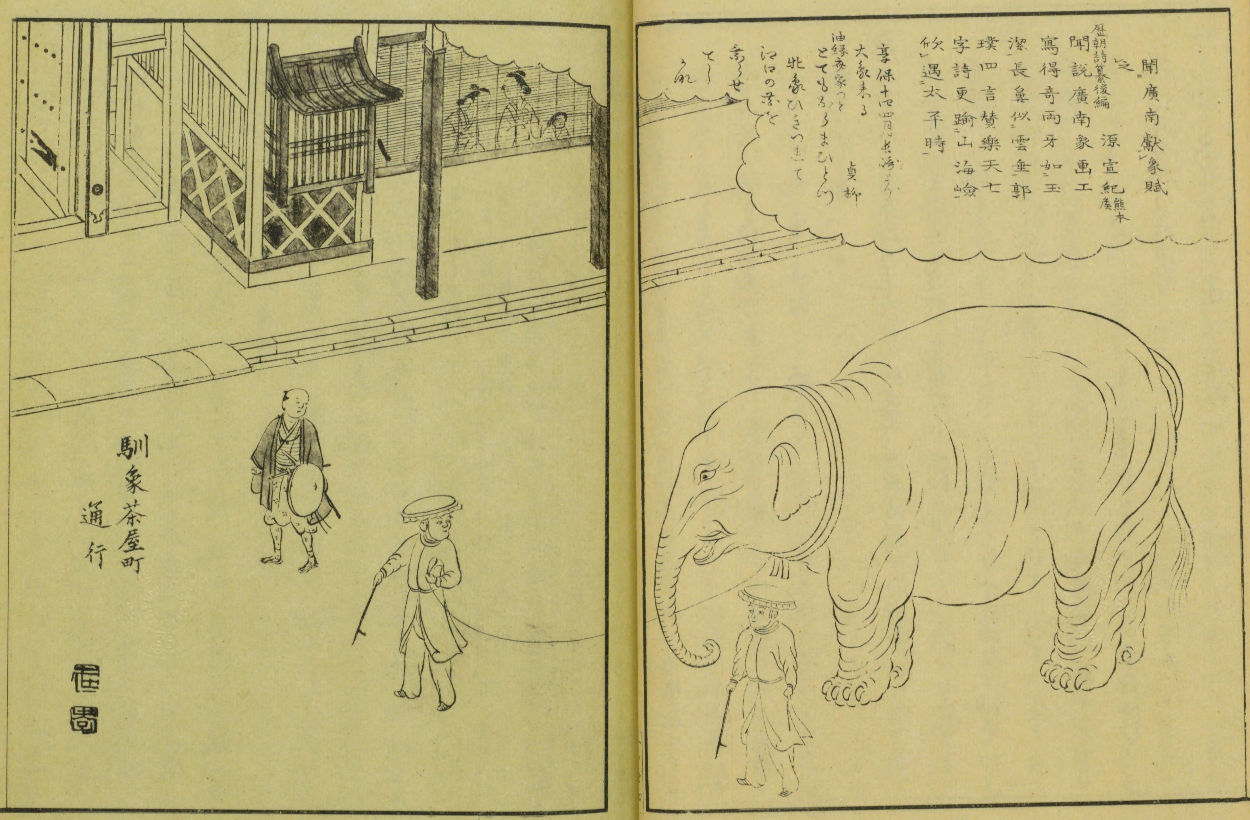 1728年にベトナムから長崎に送られた牡象が、1729年に江戸へ向かう途中、尾張名古屋を通行した際の様子を描いたもの。